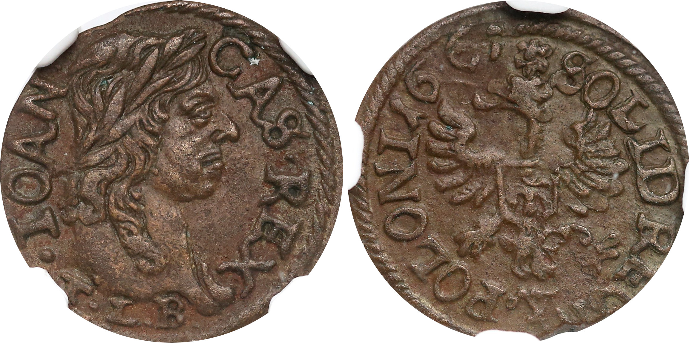 Boratynka koronna 1661 Ujazdow